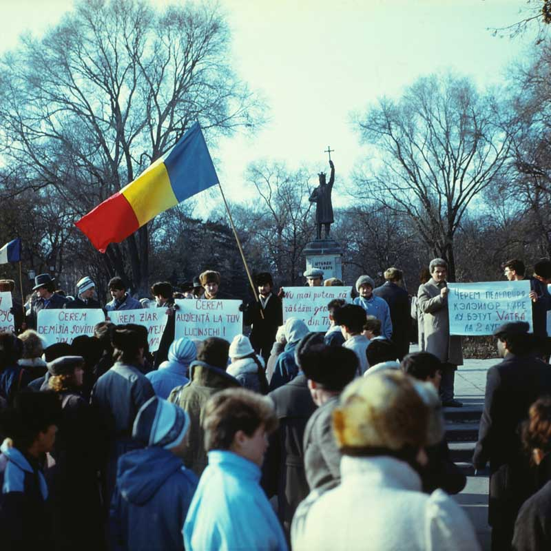 We demand... (1989).